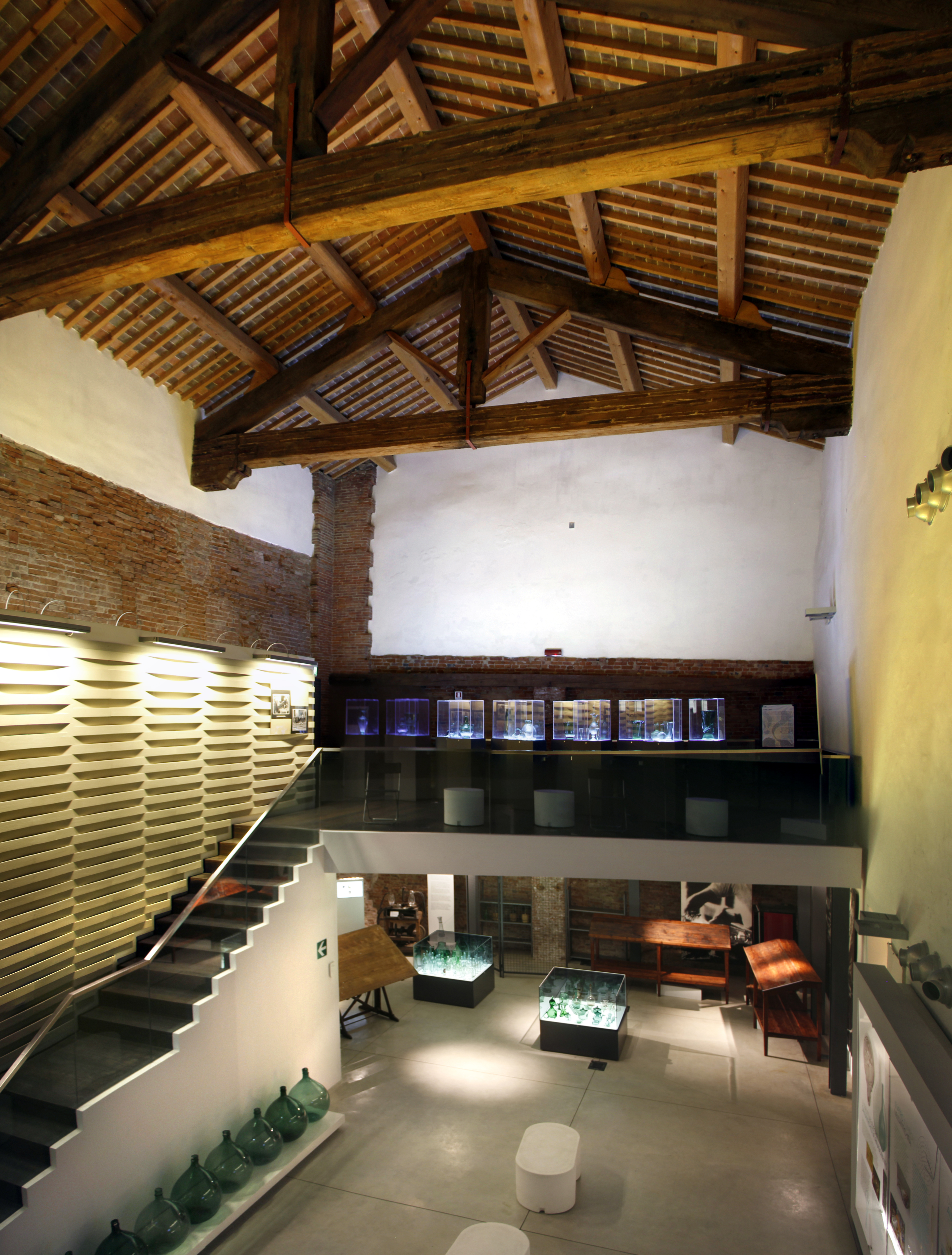 Museo del Vetro di Empoli - ex Magazzino del Sale (esterno) This is a photo of a monument which is part of cultural heritage of Italy.